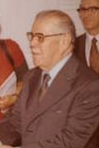 El presidente uruguayo Aparicio Méndez